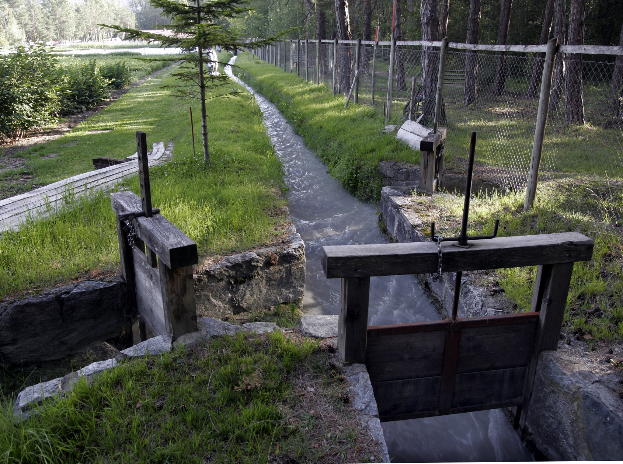 ein Waal in Prad (Südtirol), Nähe Campingplatz Kiefernhain mit drei Wehren zum Umleiten des Wassers